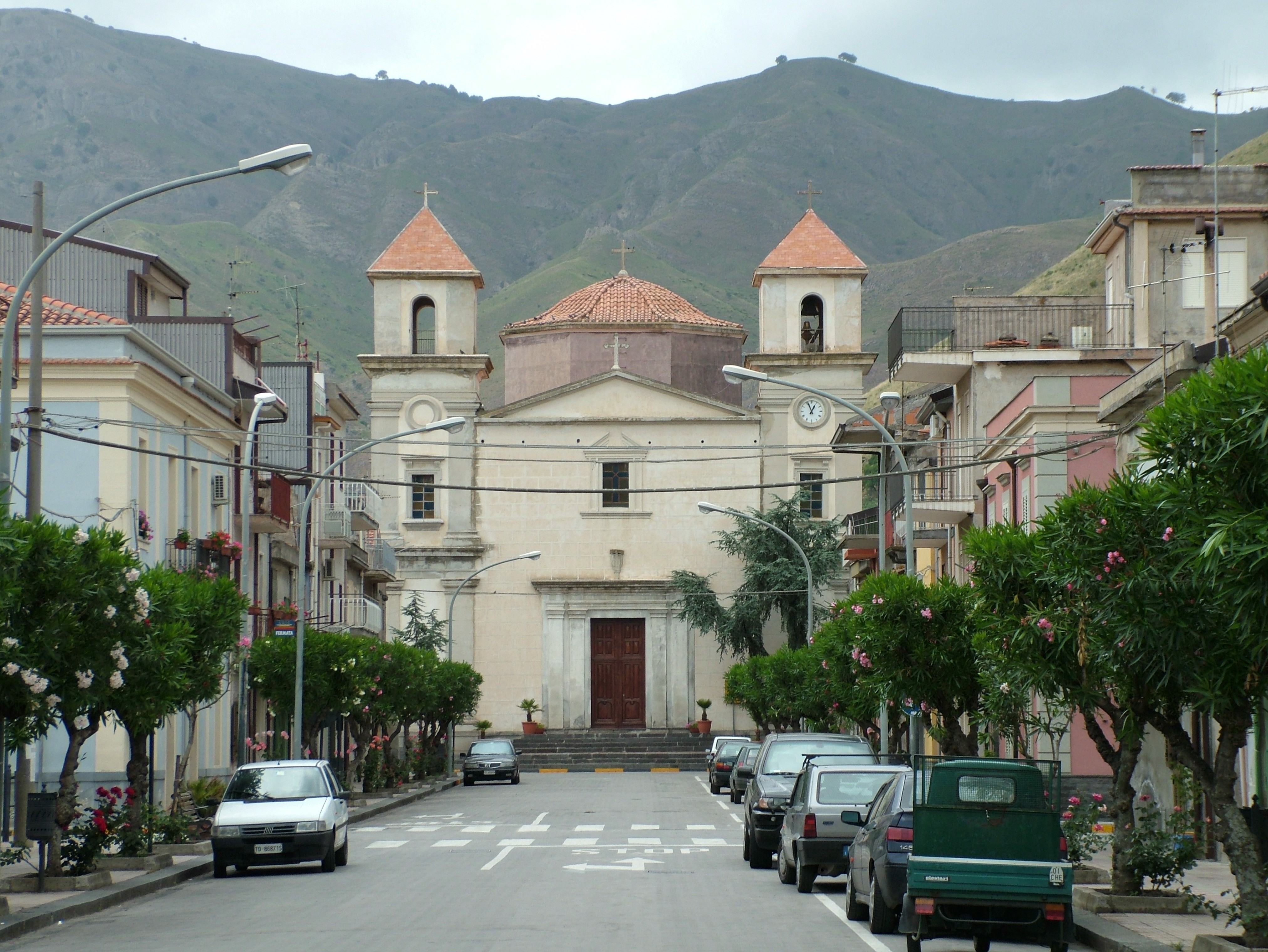 Moja Alcantara, Sizilien, Provinz Messina, die Kirche